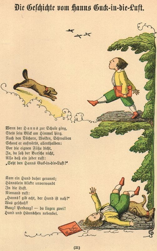 Der Struwwelpeter: Die Geschichte vom Hanns Guck-in-die-Luft Tafel 1